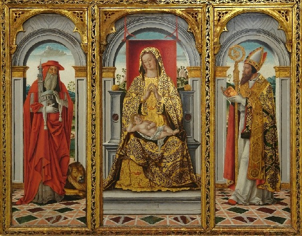 LEONARDO BOLDRINI Vergine in trono con Agostino e san Gerolamo 1490 circa Venezia, Museo Correr, Procuratie Nuove